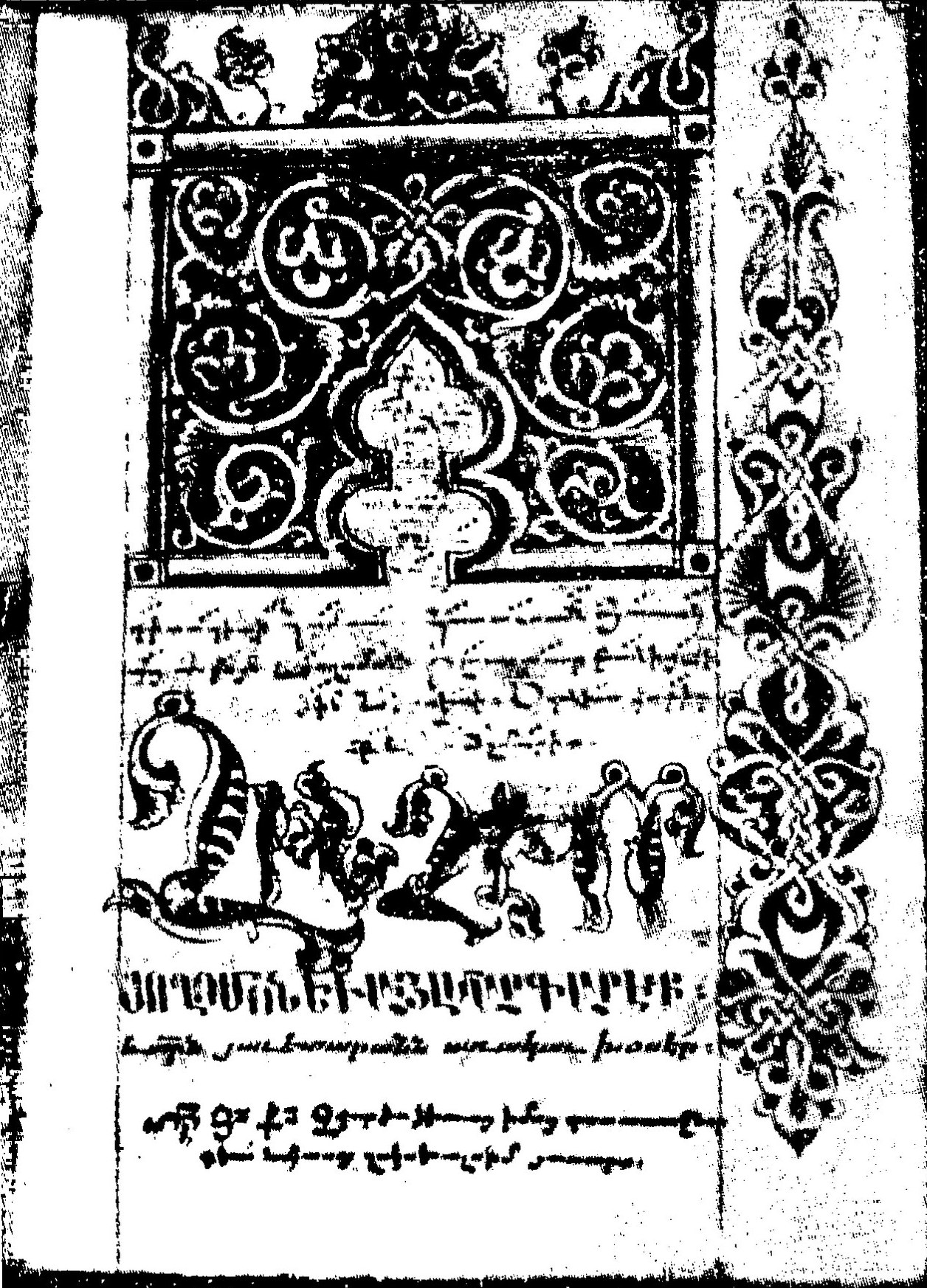 Հովհան Որոտնեցու փիլիսոփայական երկերի ժողովածուն (Երևանի Մեսրոպ Մաշտոցի անվան Մատենադարան, ձեռ. № 4268, էջ 1 ա)